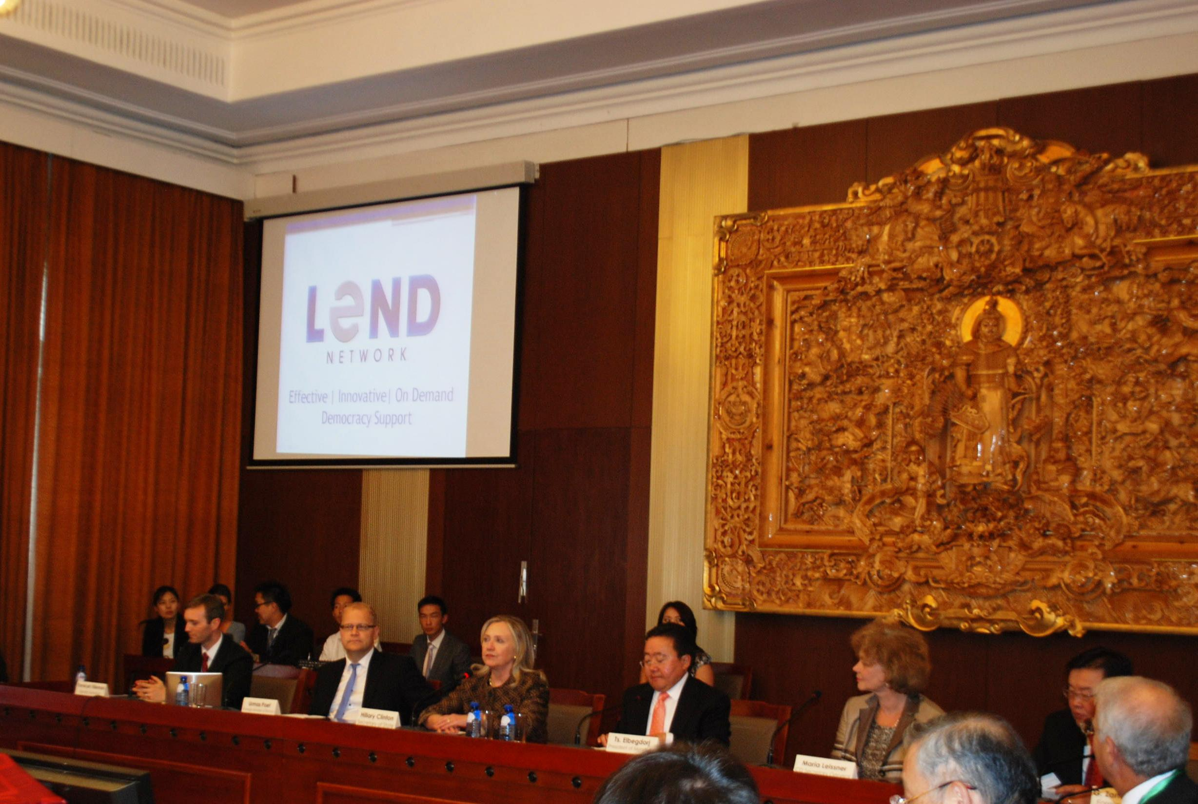 Välisminister Urmas Paet ja USA riigisekretär Hillary Clinton kuulutasid Mongoolias Ulanbaatoris välja uute demokraatiate ja nende liidrite nõustamisprojekti LEND (Leaders Engaged in New Democracies)